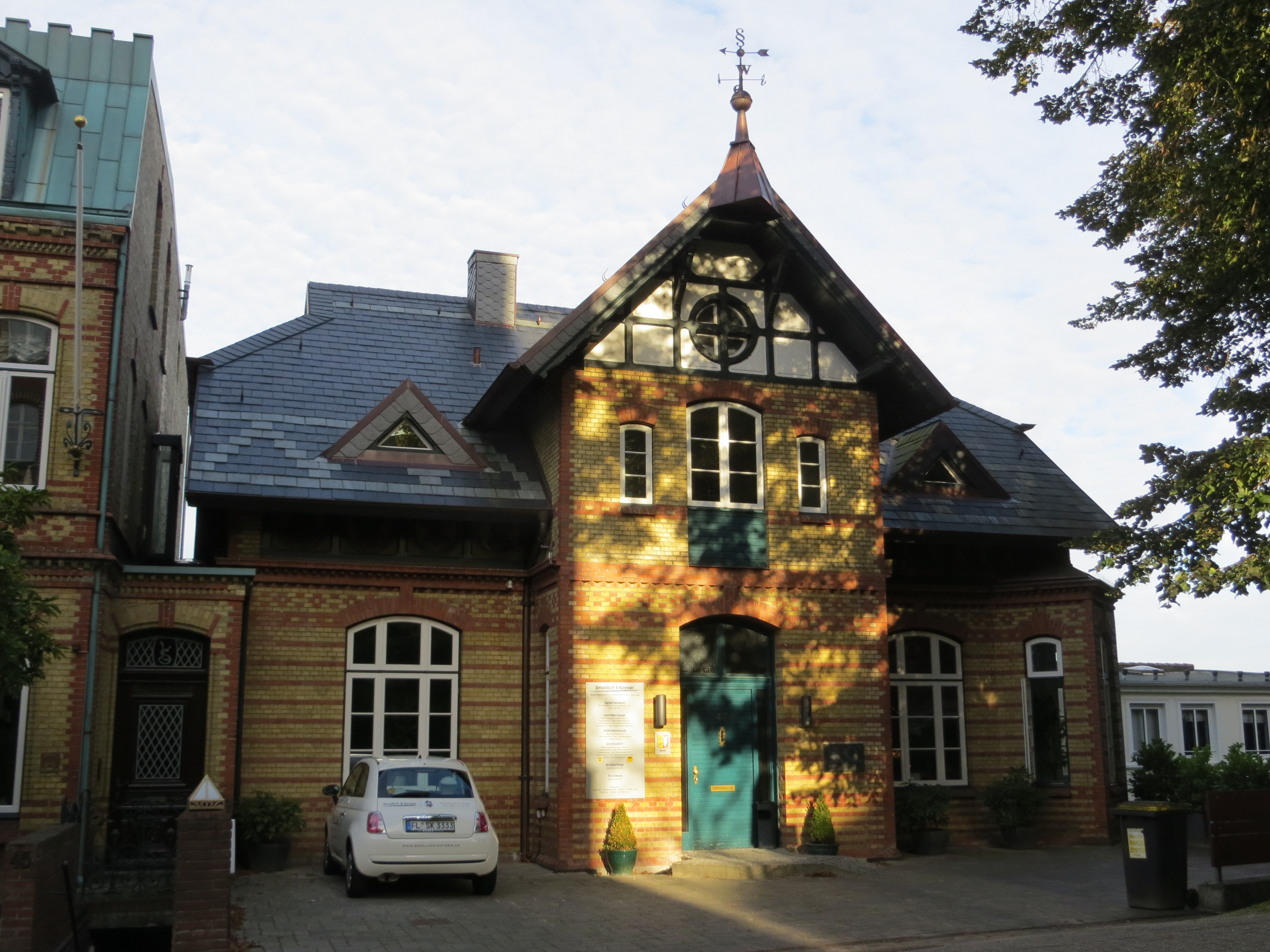 Heinrich-Sauermann-Villa am Südergraben 47 (Flensburg), Bild 01; Schönes Haus 1978, Dank der Bürger